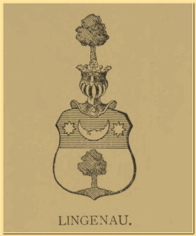 Lingenau herb szlachecki wg Juliusza Ostrowskiego